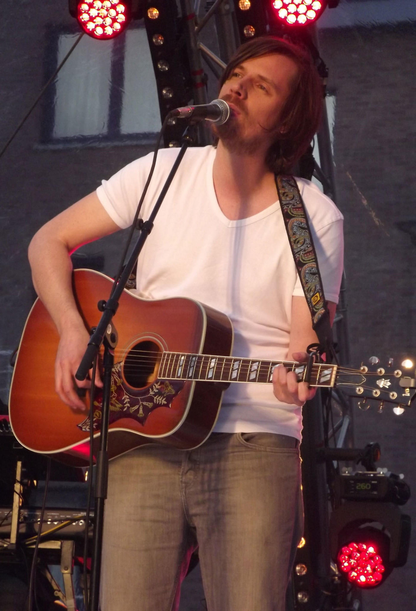 Zanger Marco Z tijdens de opnames van het muziekprogramma Vlaanderen Muziekland in Blankenberge op 28 juli 2012. De desbetreffende aflevering werd op 10 augustus 2012 uitgezonden op de Vlaamse zender één.